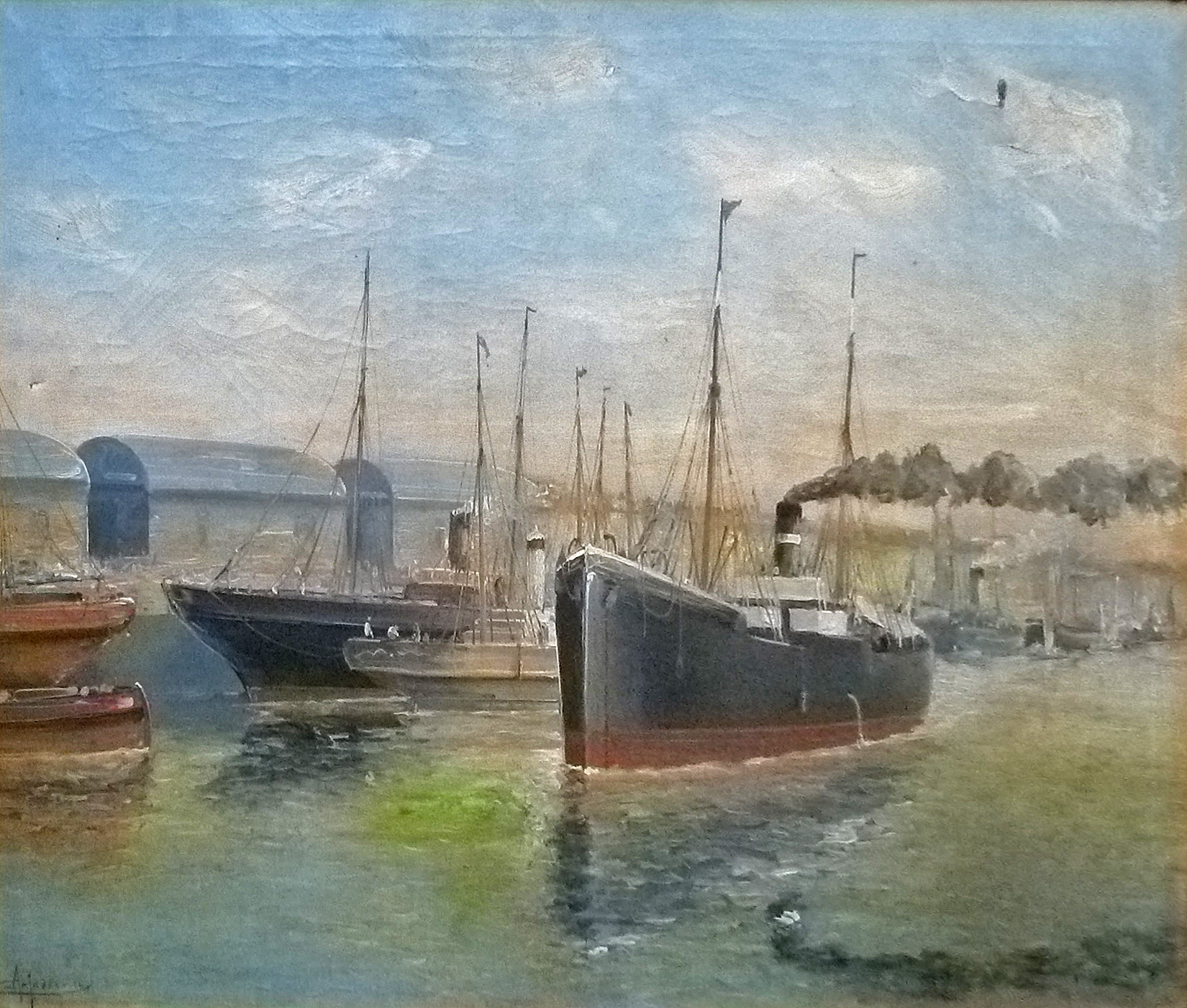 "Haven van Duinkerke", olieverf op doek door Albert Jaboneau; privé-collectie